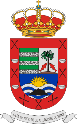 Escudo de Valle Gran Rey, en la provincia de Santa Cruz de Tenerife (España)